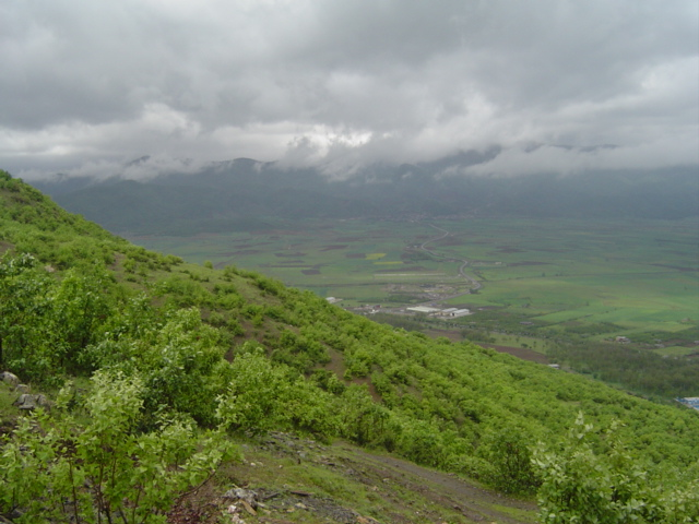 Maravan Fields, Kordestan, Iran